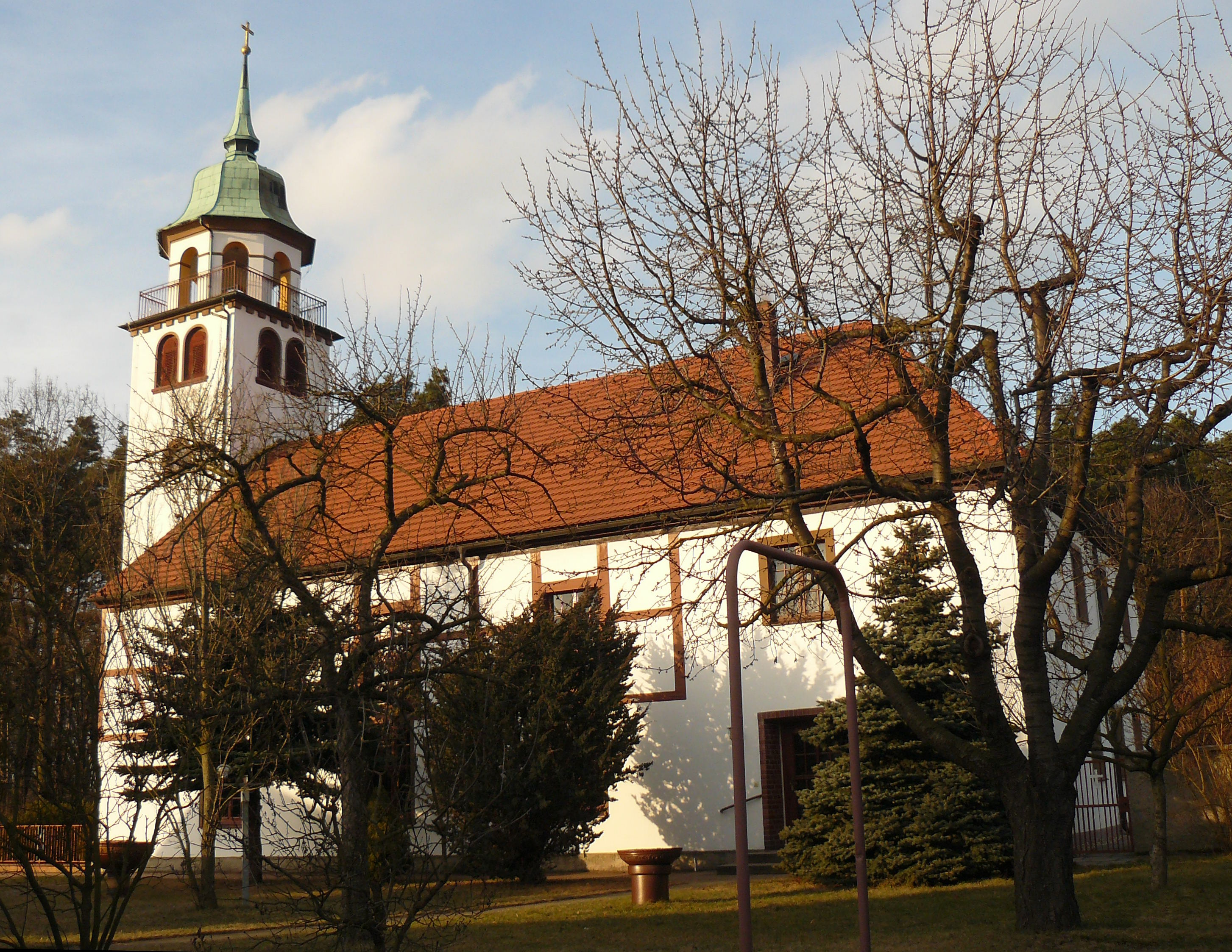 Evangelische Kirche der Altlutheraner in Klitten (Landkreis Görlitz) Hornjoserbsce: Starolutherska cyrkej w Klětnom, gmejna Hamor